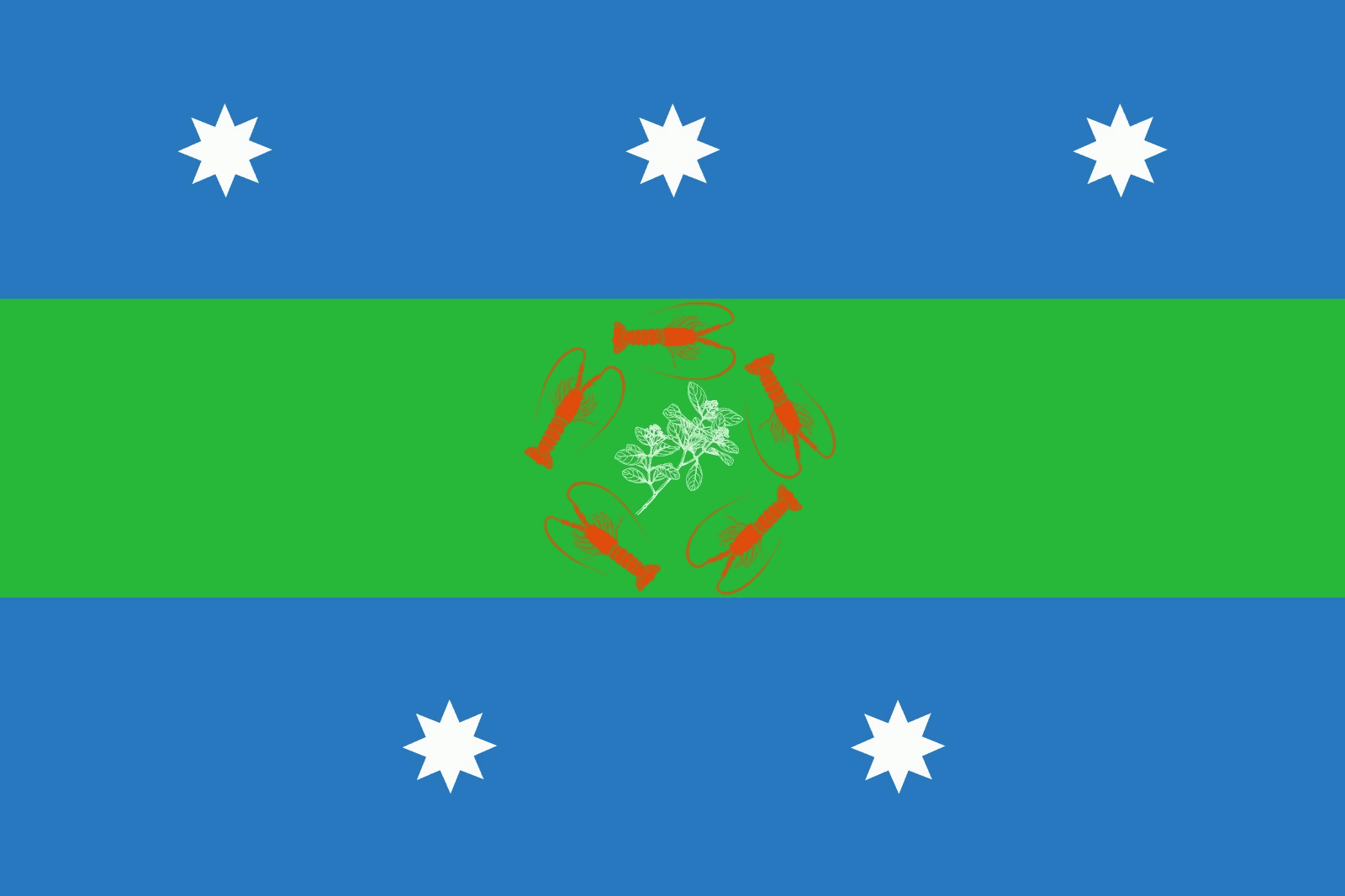 Bandera de la comuna y archipiélago de Juan Fernández (Chile)